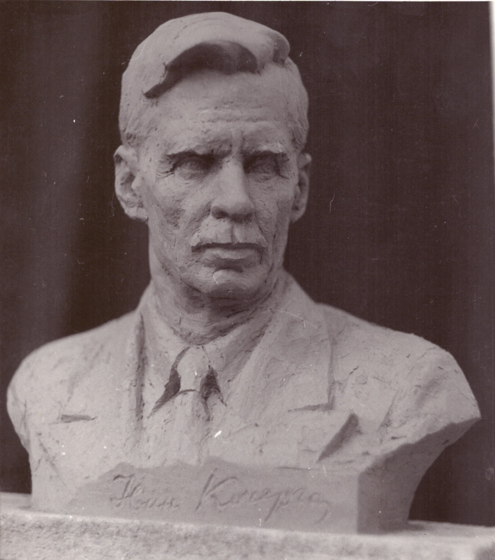 Портрет українського драматурга Кочерги І.А. 1984. Скульптор Таранченко В.О. Гіпс. 24 х 24 х 15.